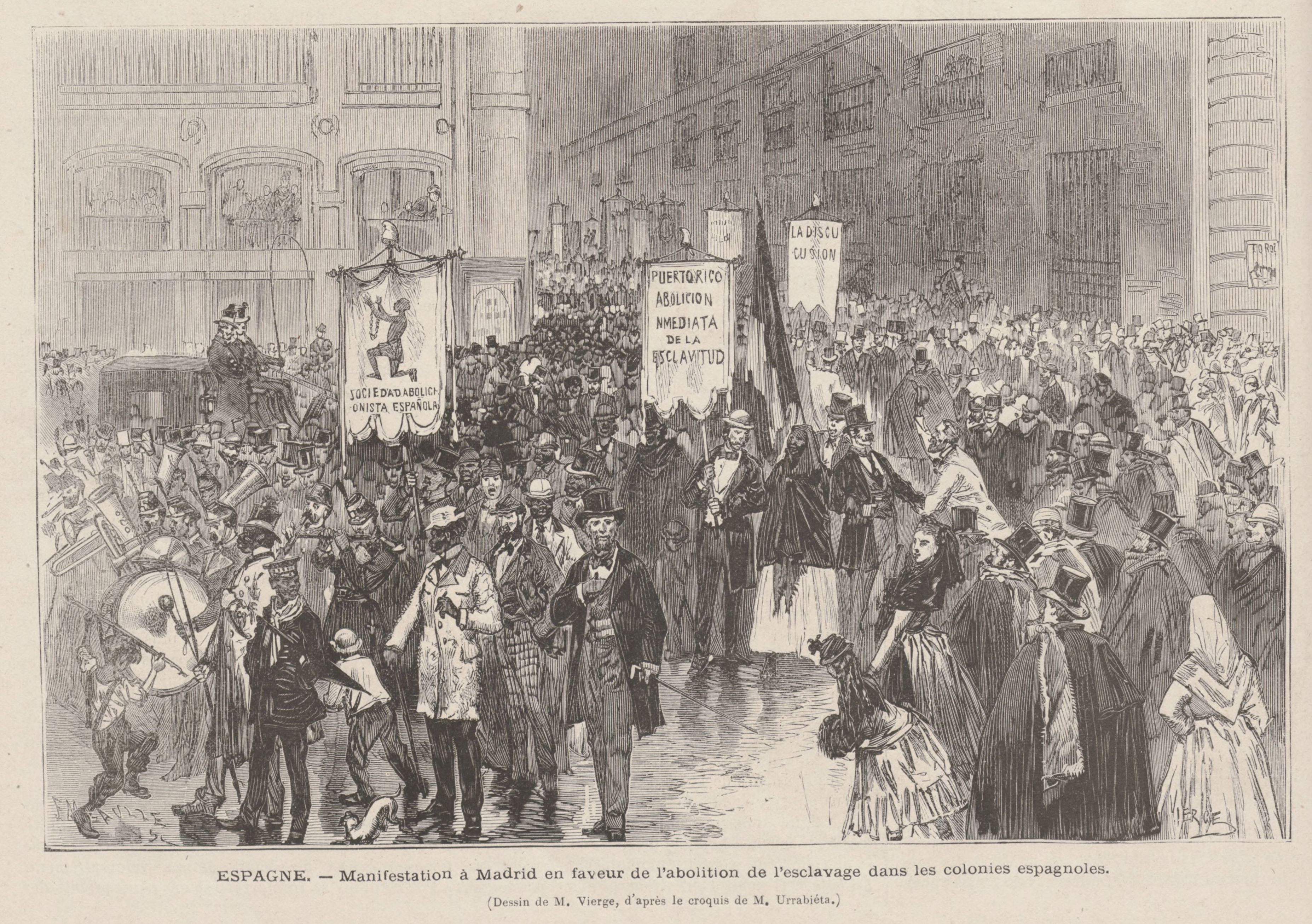 Espagne, Manifestation à Madrid en faveur de l'abolition de l'esclavage dans les colonies espagnoles.